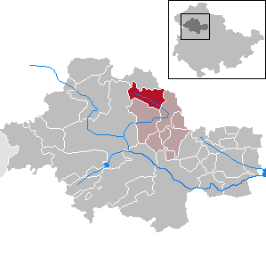 Obermehler in Thuringia - Unstrut-Hainich-Kreis